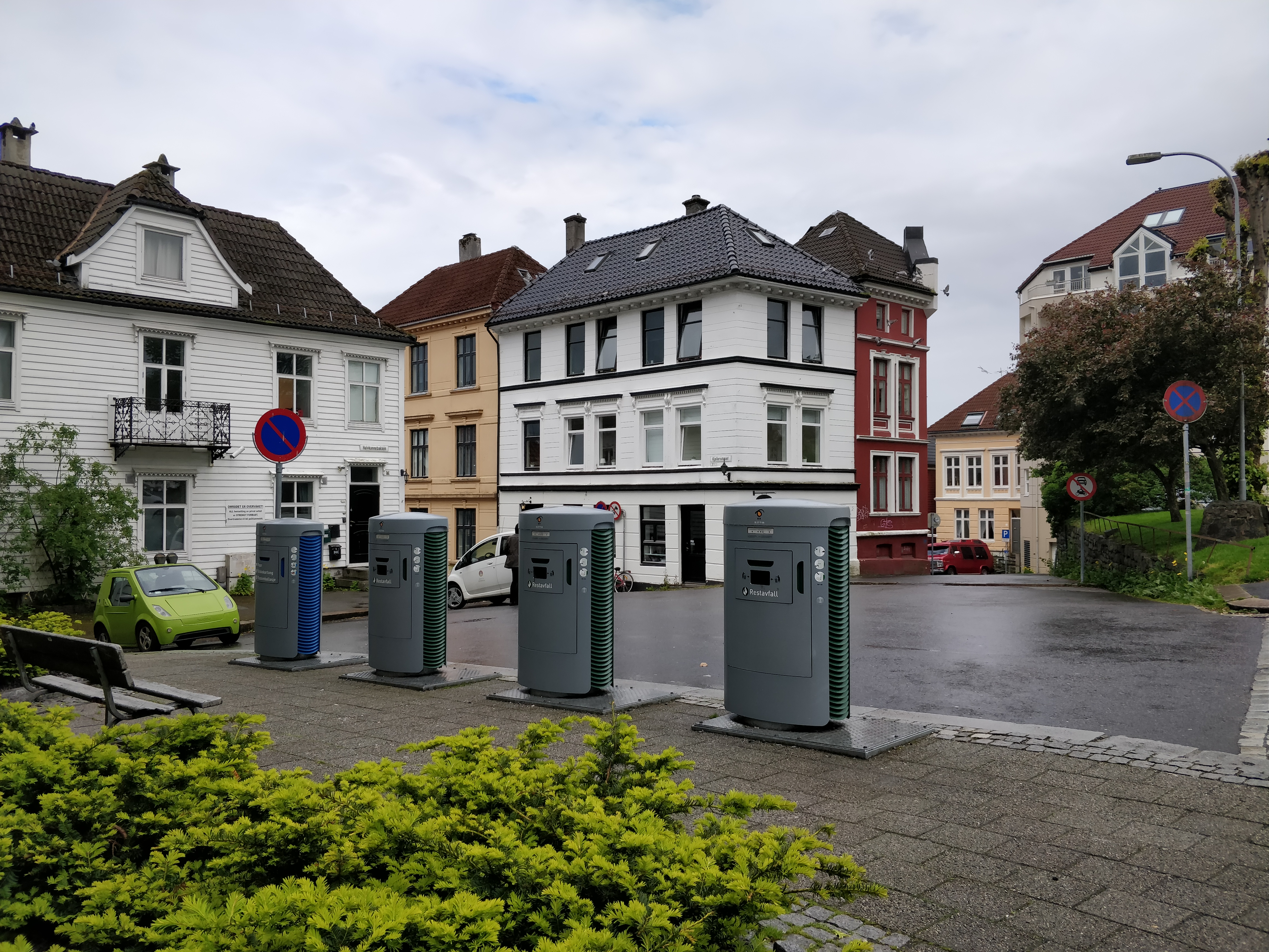 Nedkast til Bossnettet i Bergen ved Hennebysmauet. De som er grønn på siden er for restavfall, mens den blå er plast og papir.